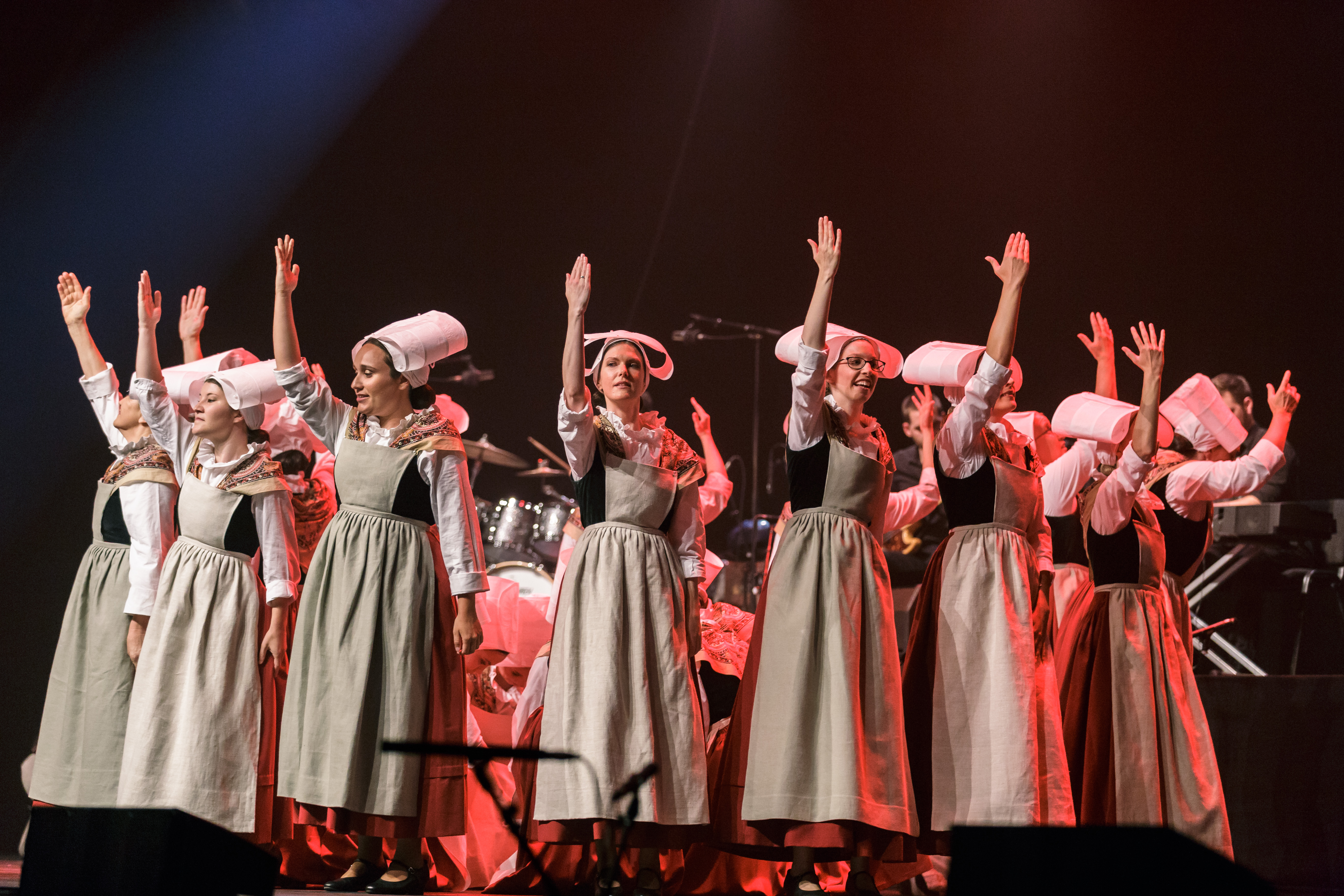 Le cercle Les Perrières de Cesson-Sévigné lors du spectacle Kement Tu, organisé par la confédération de danse War’l Leur dans le cadre du Championnat de Bretagne au Pavillon de Penvillers à Quimper le 22 juillet 2017.